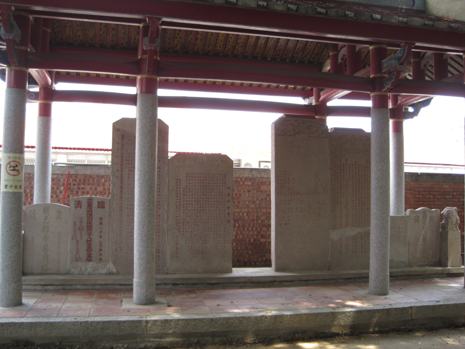 臺南開元寺碑亭。